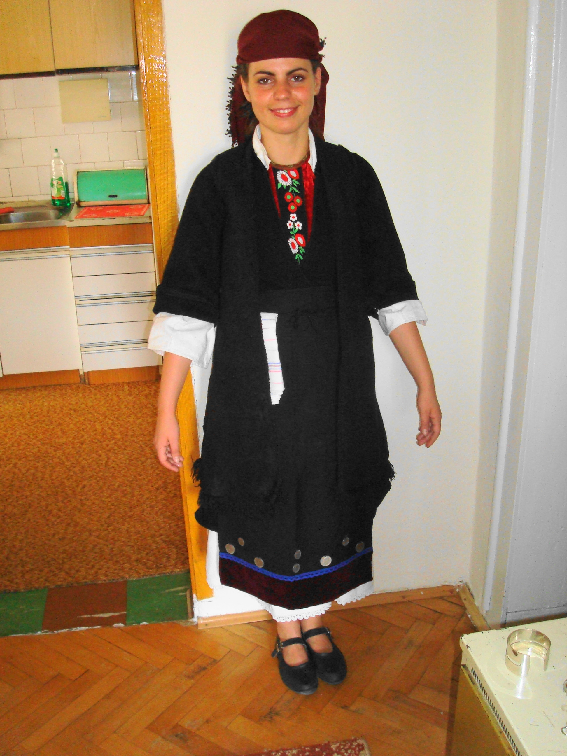 Женска преспанска ношња.